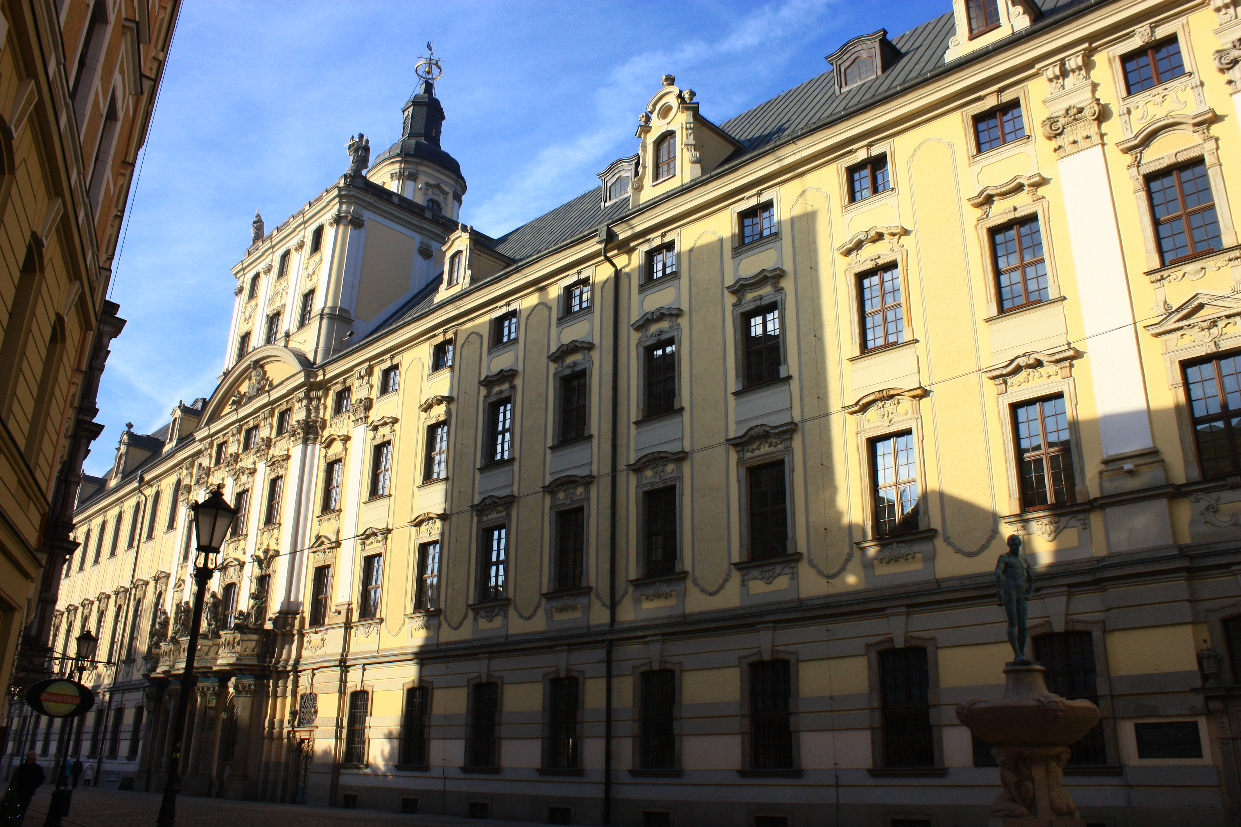 Wrocław, kolegium jezuickie, ob. Uniwersytet Wrocławski